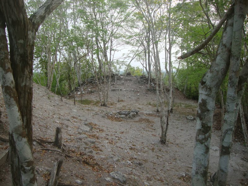 Espacio sobre la gran Pirámide de la ciudad maya de Nakbé en Petén, Guatemala.